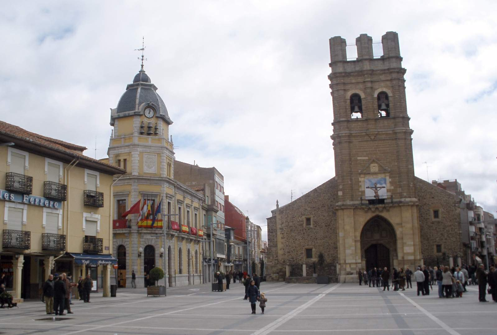 Plaza Mayor de La Bañeza